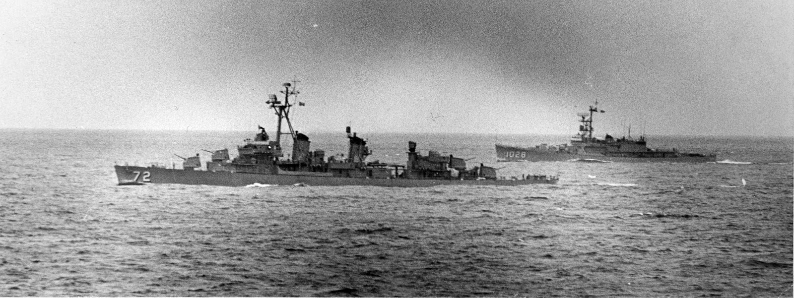 Foto del Destructor peruano BAP Almirante Guise (DD-72) y el destructor escolta estadounidense USS Van Voorhis (DE-1028) durante los ejercicios de UNITAS VI en 1965.